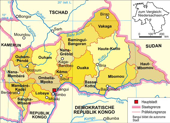 Politische Karte der Zentralafrikanischen Republik